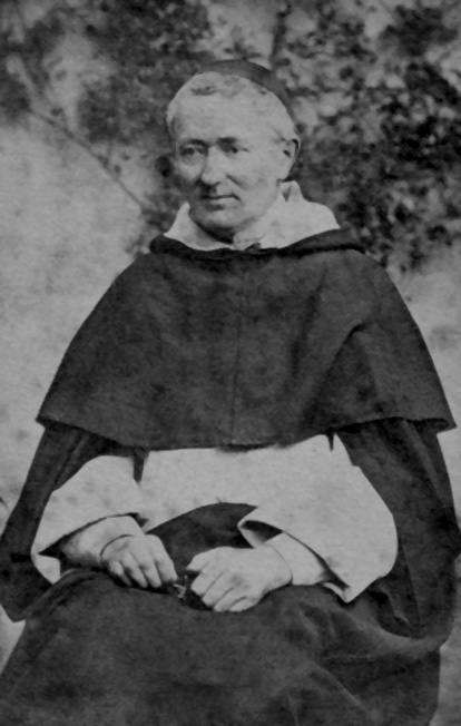 Alexandre Vincent Jandel OP (1810-1872)